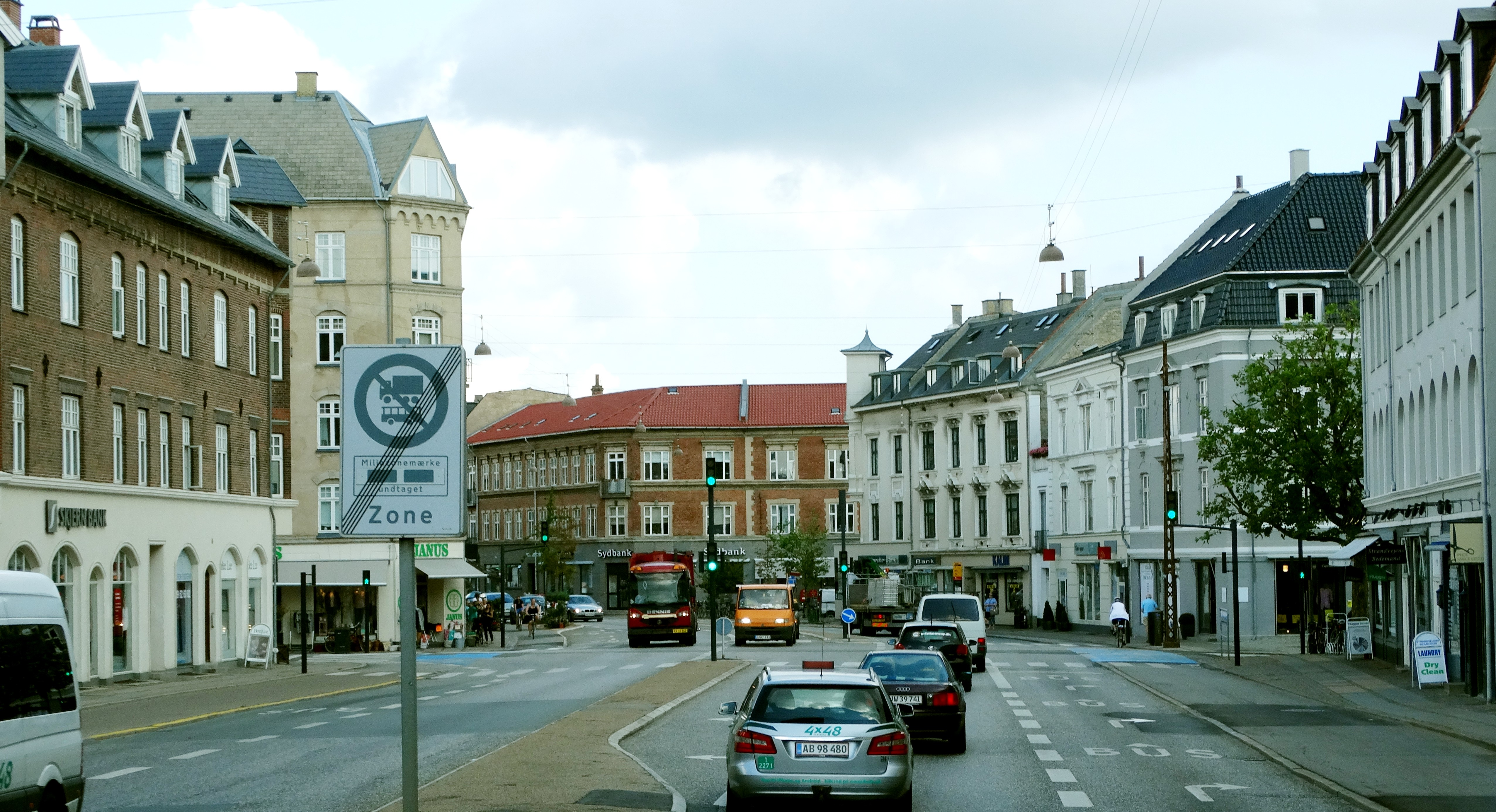 Denmark - Copenhaguen